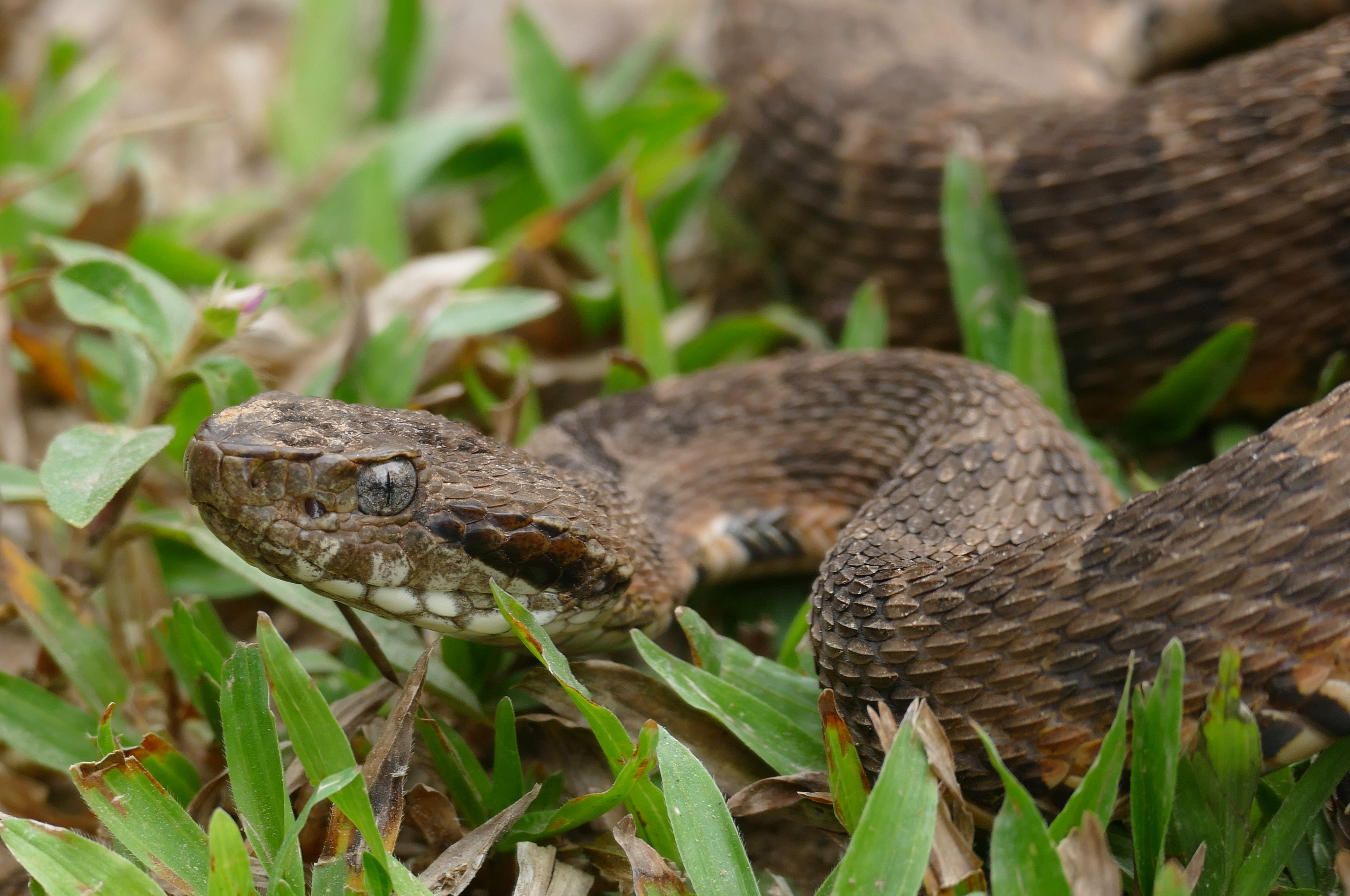 Pouso Alegre, Transpantaneira, Poconé, Mato Grosso, BRAZIL